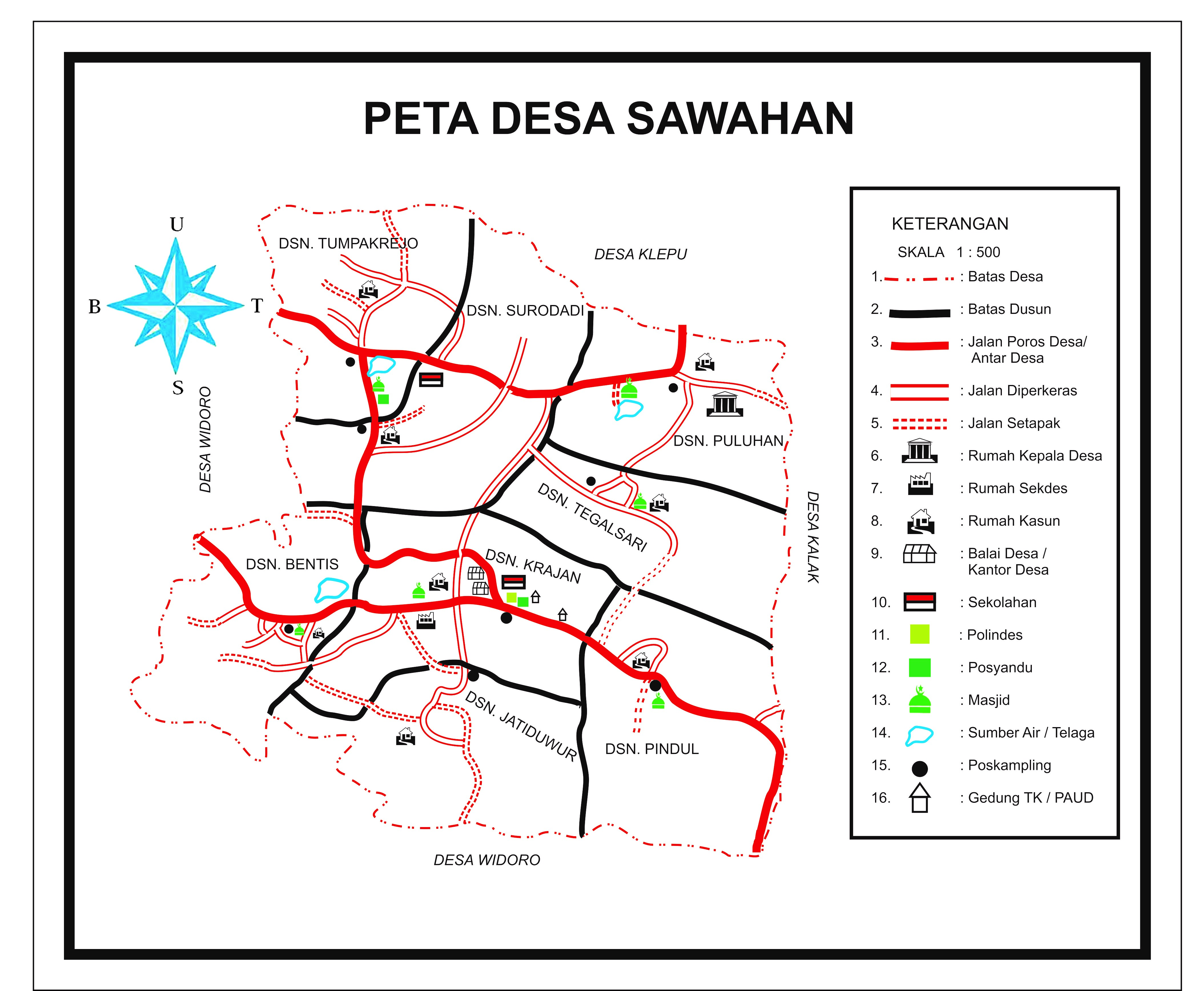 Peta Desa Sawahan